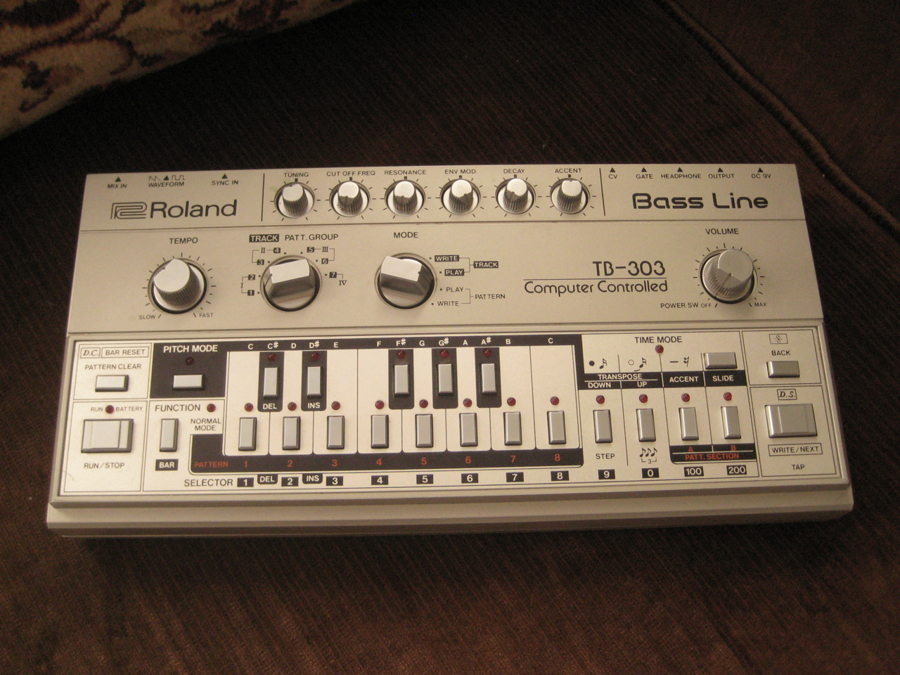 “Sir Harry Of Oak”